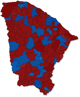 Municípios em azul possuem igrejas e congregações federadas a Igreja Presbiteriana do Brasil no Ceará.